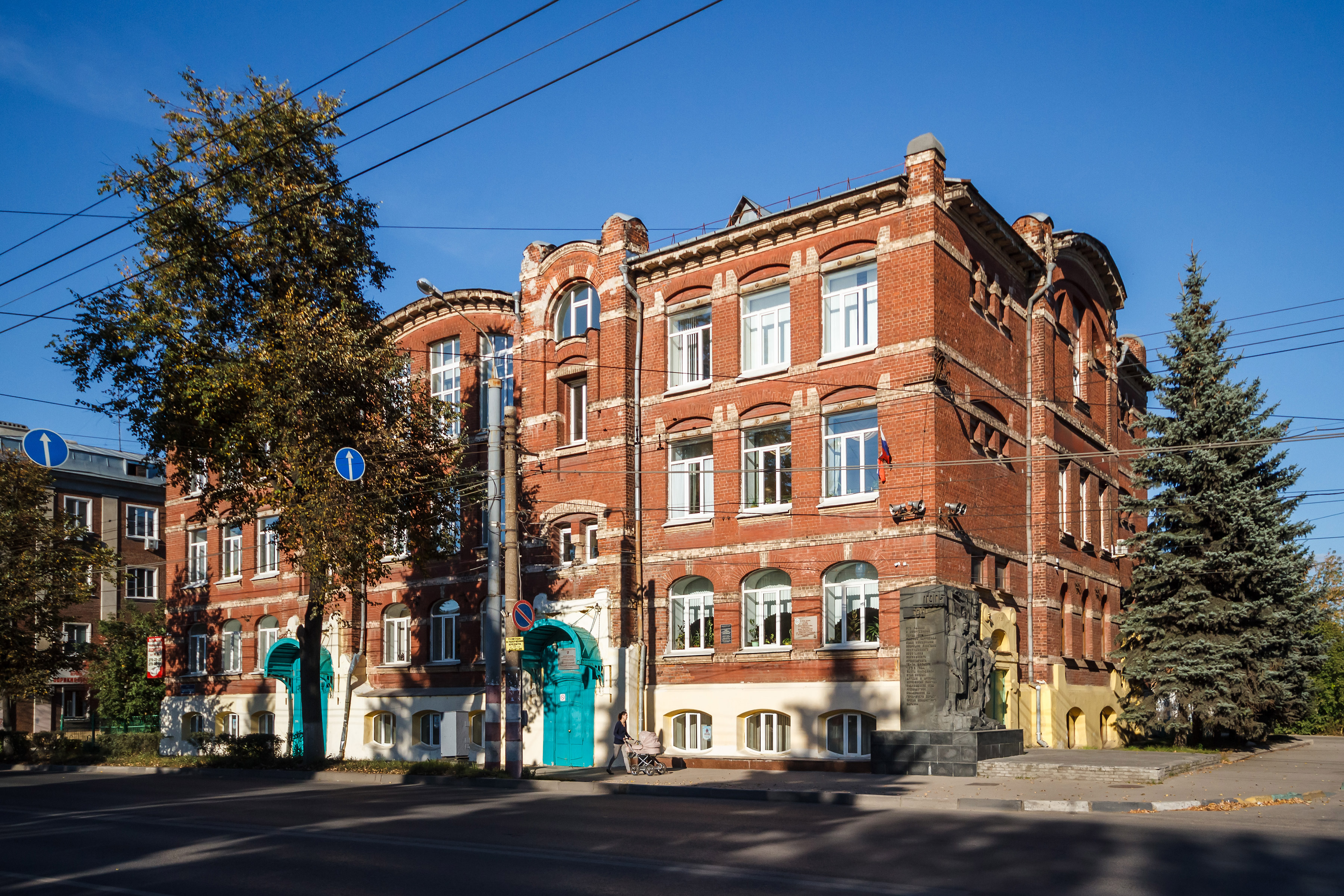 Здание церковно-приходской школы: улица Коминтерна, 175, Нижний Новгород, Нижегородская область